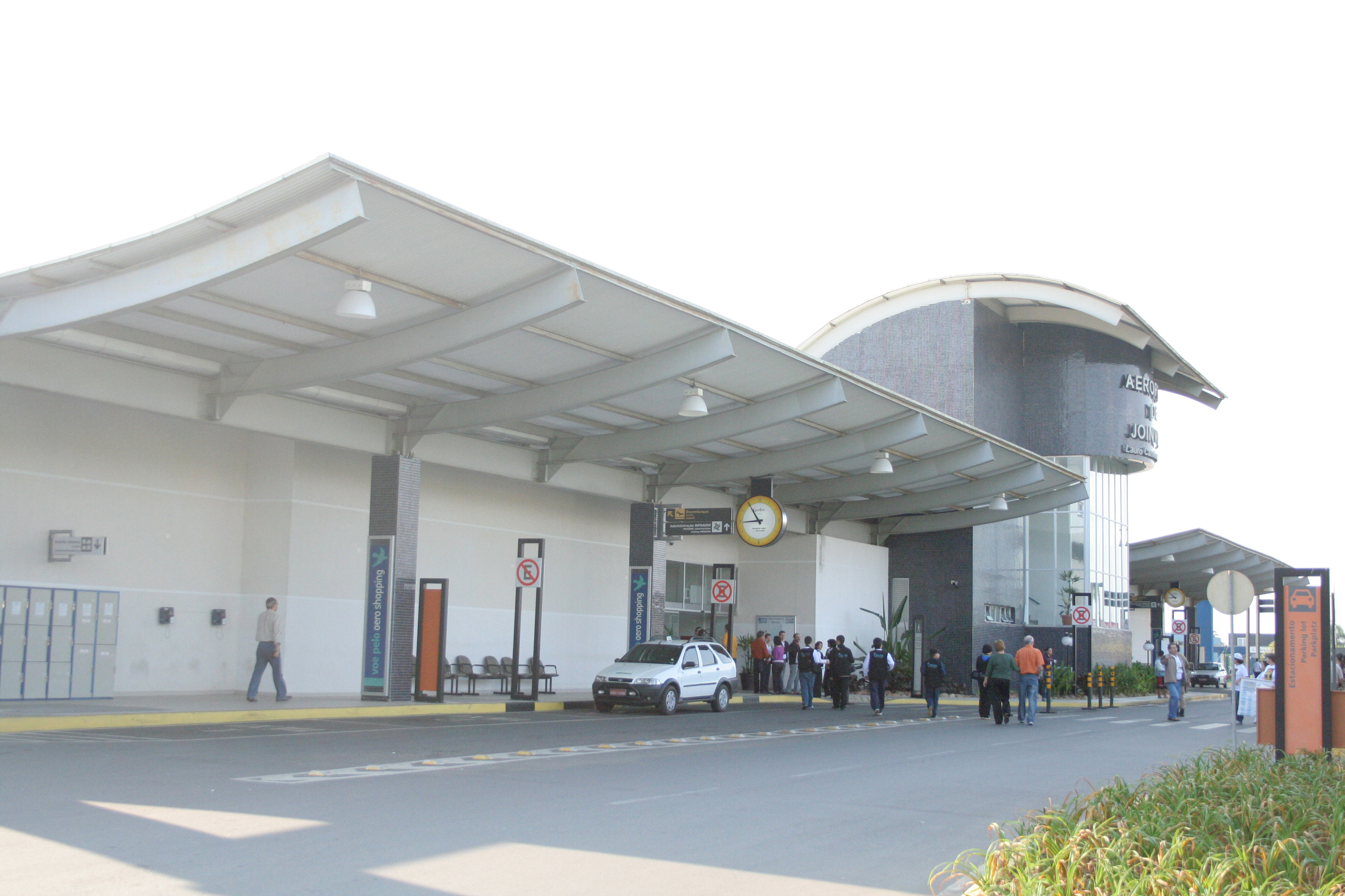 Joinville Airport.